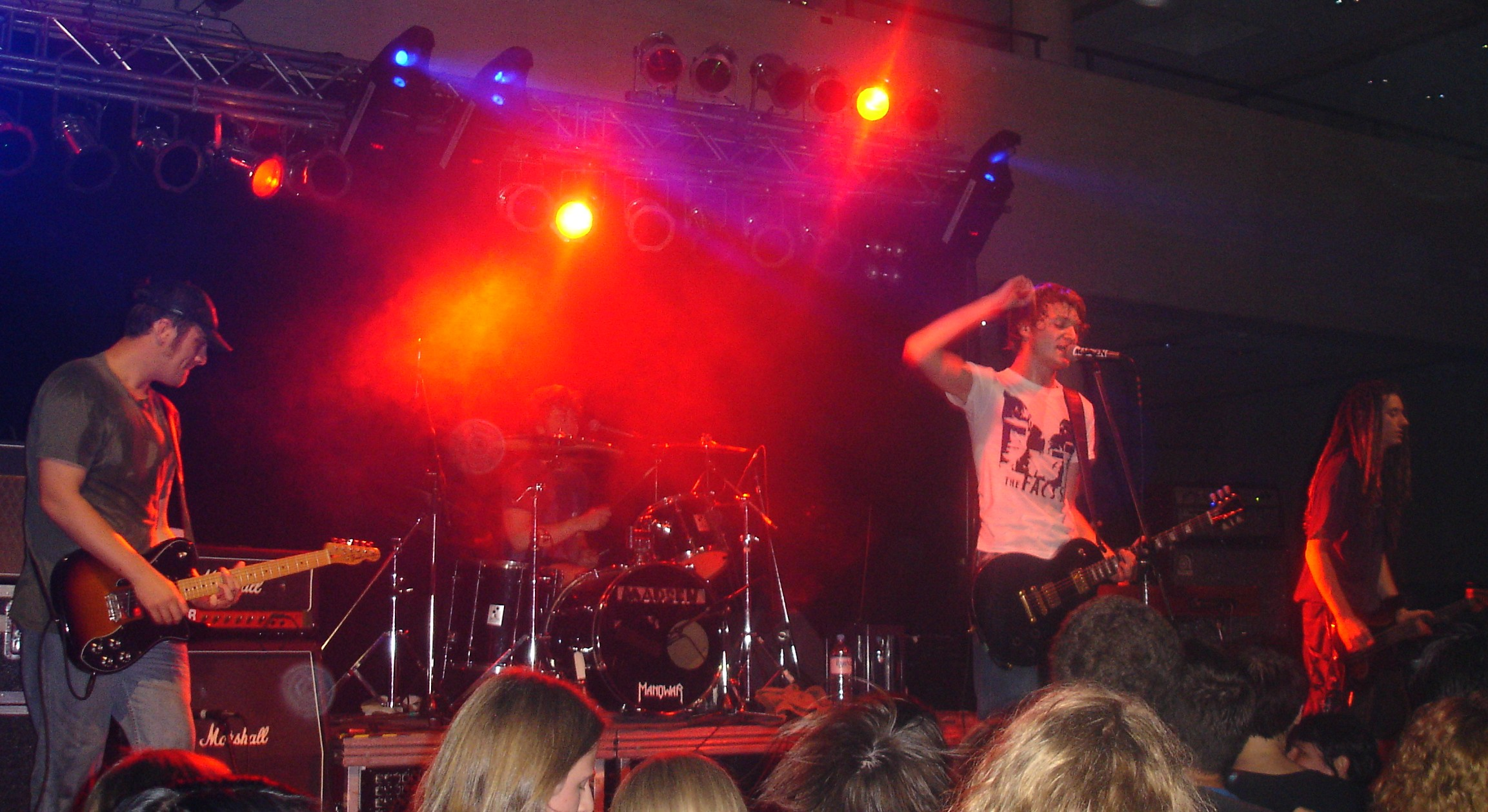 Konzert der deutschen Band Madsen in der Göttinger Zentralmensa beim Campus Live Open Air (aufgrund des schlechten Wetters wurde die Veranstaltung in das Unigebäude verlegt.)